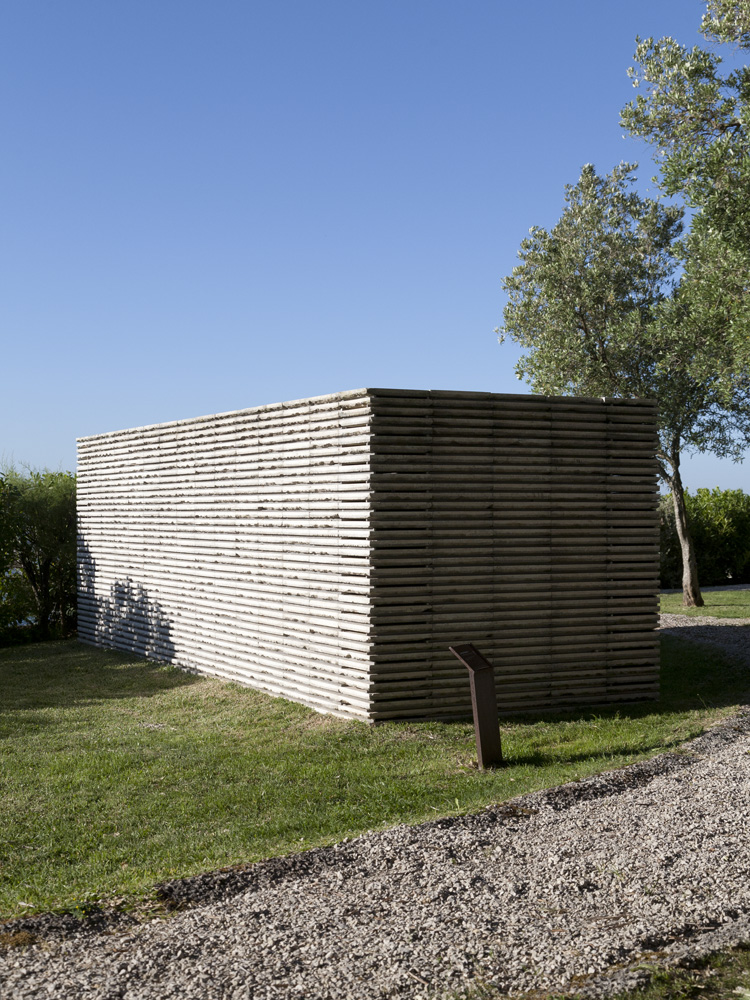 Carlos Nogueira, Mais longe e límpido ao longo, aço inox, vidro, mosaico hidráulico, 451 x 150 x 143 cm